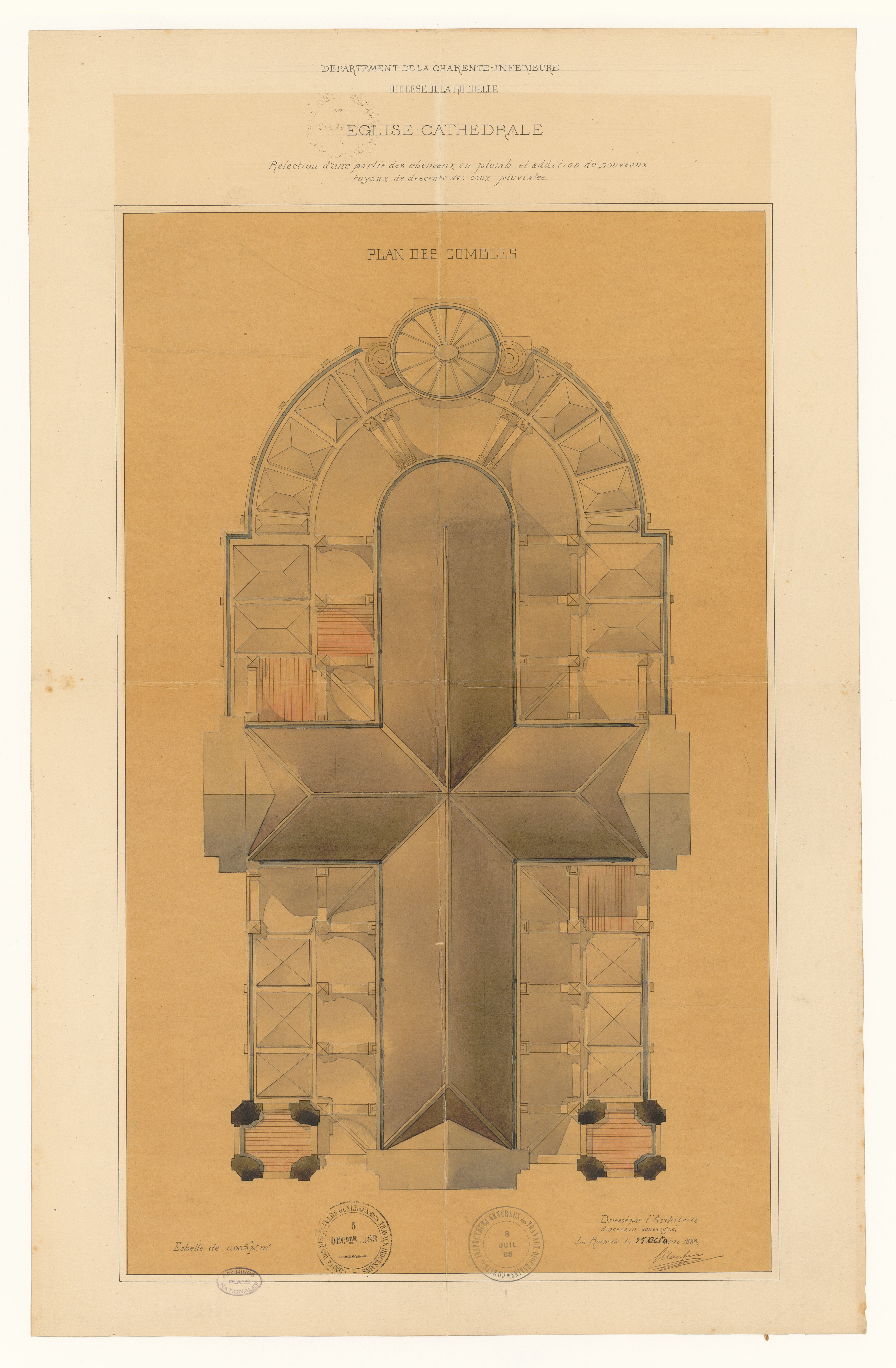 "Département de la Charente-Inférieure. Diocèse de La Rochelle. Église cathédrale. Réfection d'une partie des chéneaux en plomb et addition de nouveaux tuyaux de descente des eaux pluviales : plan des combles". Par Ernest Massiou, architecte diocésain.